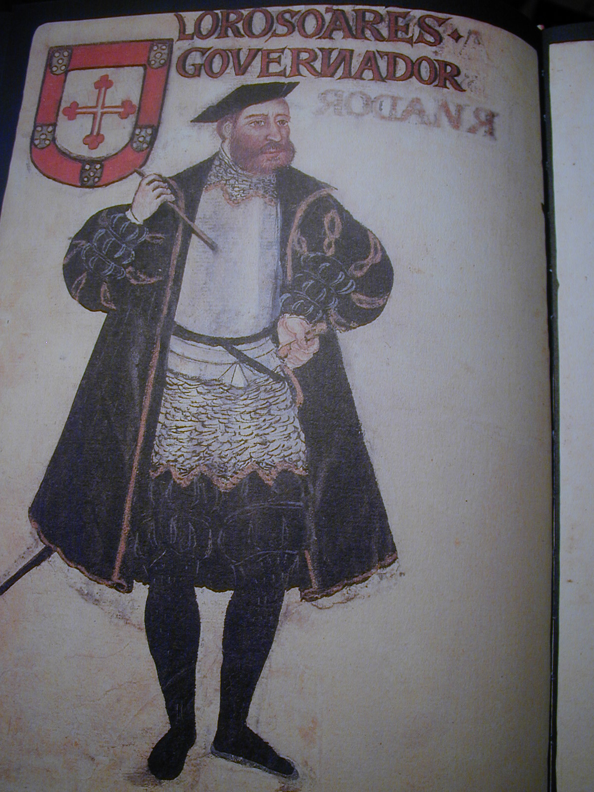 Lopo Soares de Albergaria Gouverneur de l'Inde portugaise